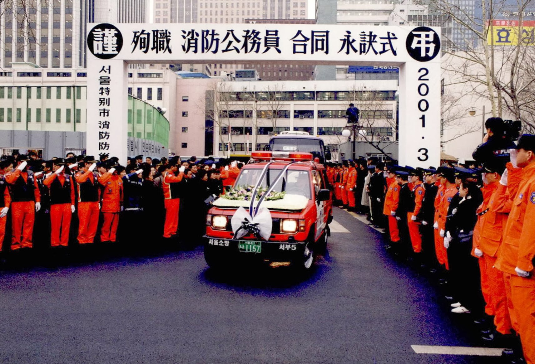 홍제동 화재 사고(弘濟洞火災事故)